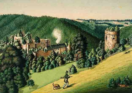 Burg Falkenstein an der Ranna